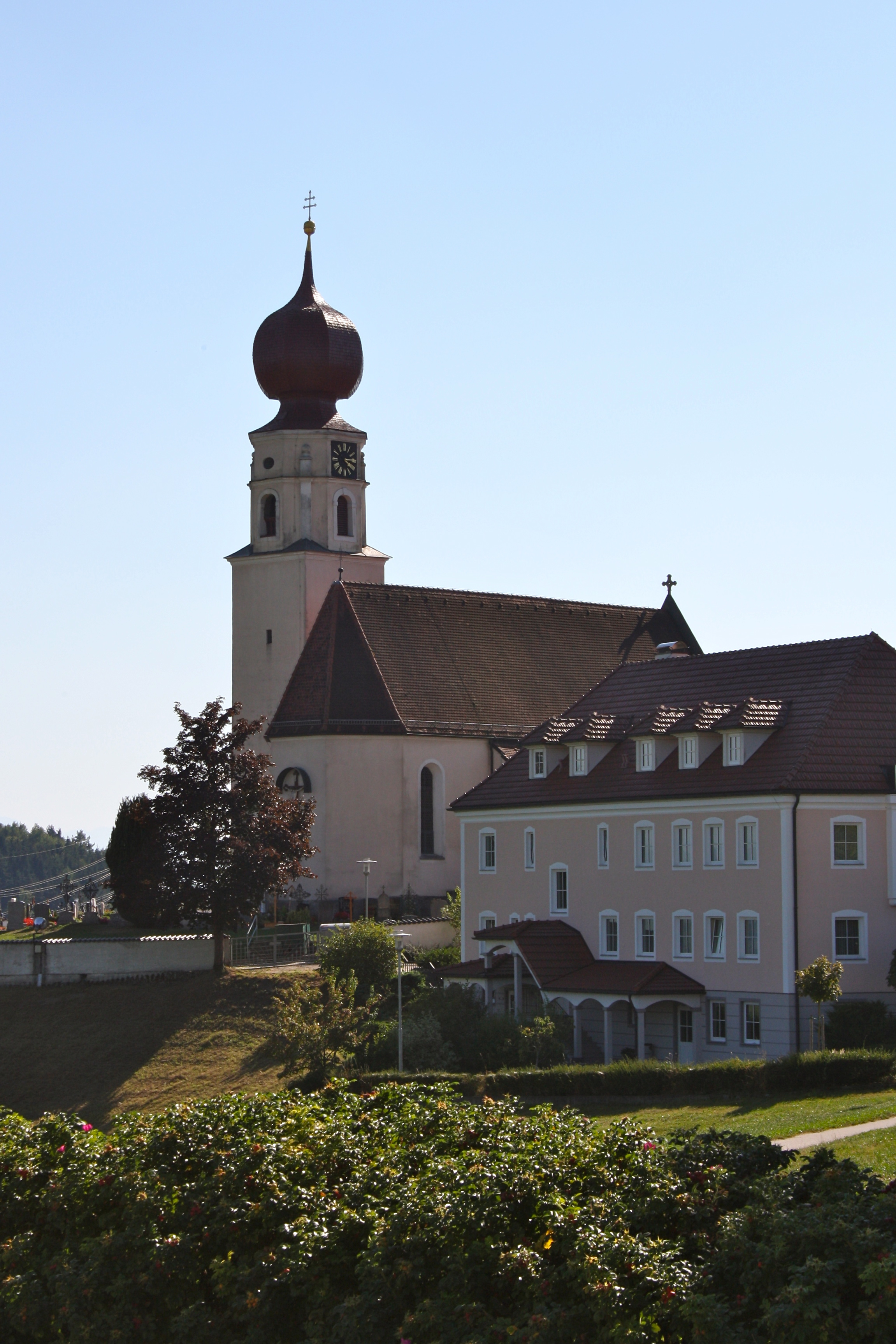 Kath. Pfarrkirche hll. Petrus und Paulus sowie Friedhof